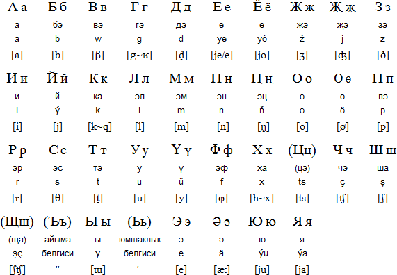 Кириллический алфавит для туркменского языка